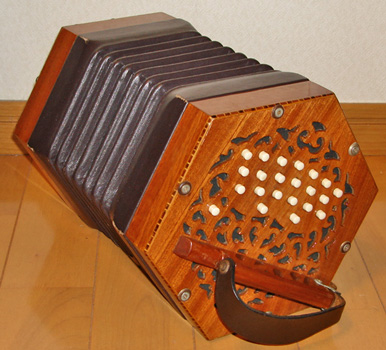 Bastari anglo-conceritina